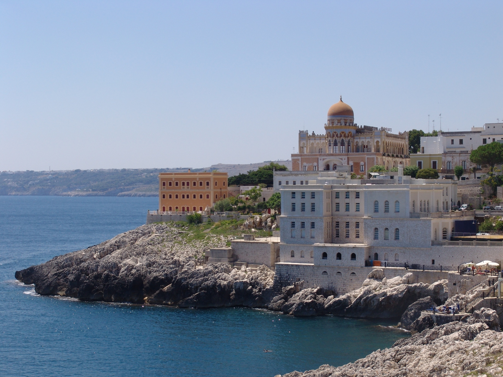 La vista dal mare di Santa Cesarea Terme con le terme in primo piano e il moresco palazzo Sticchi in secondo.